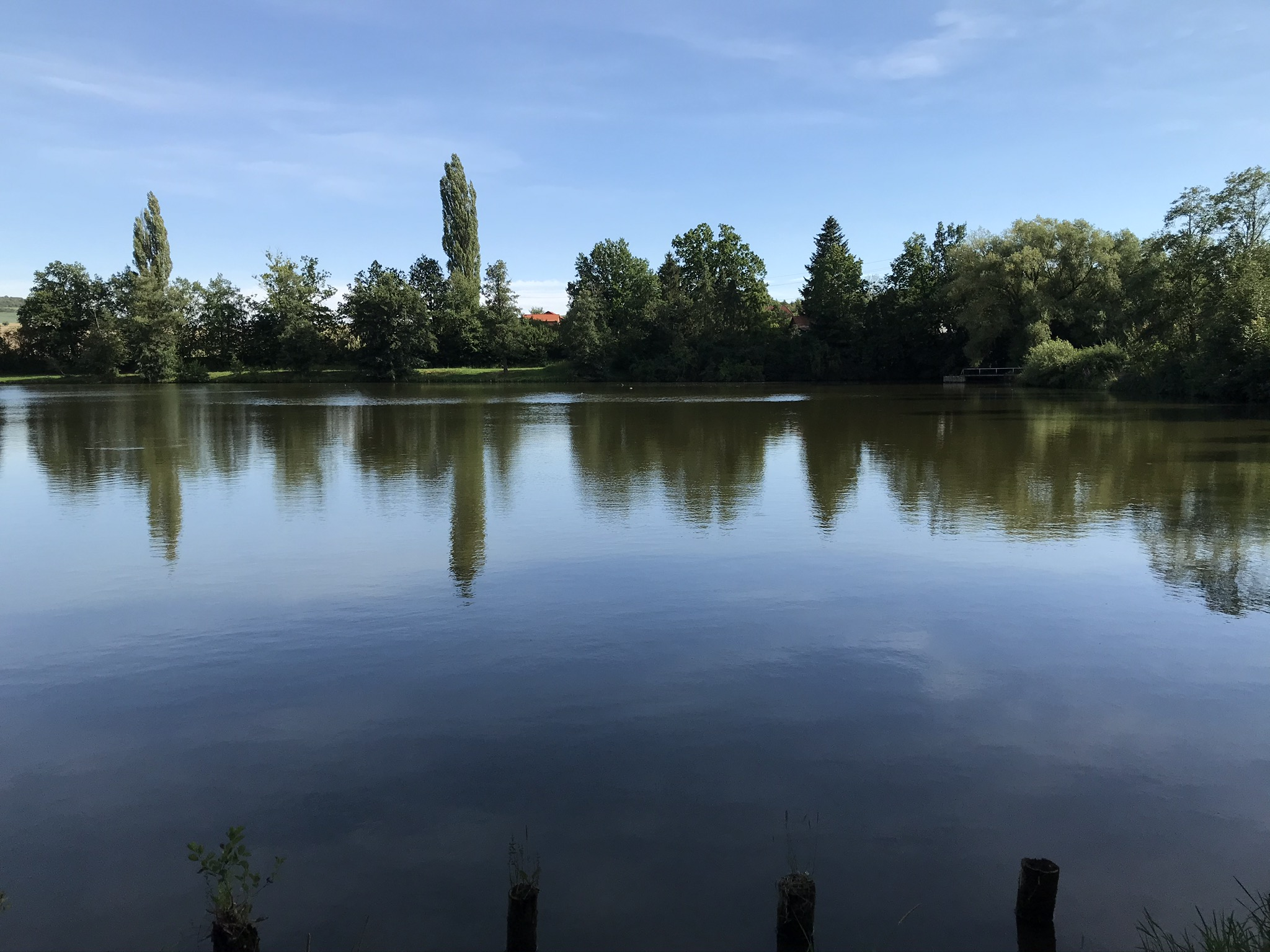 Pohled na rybník Tampák v Blovicích